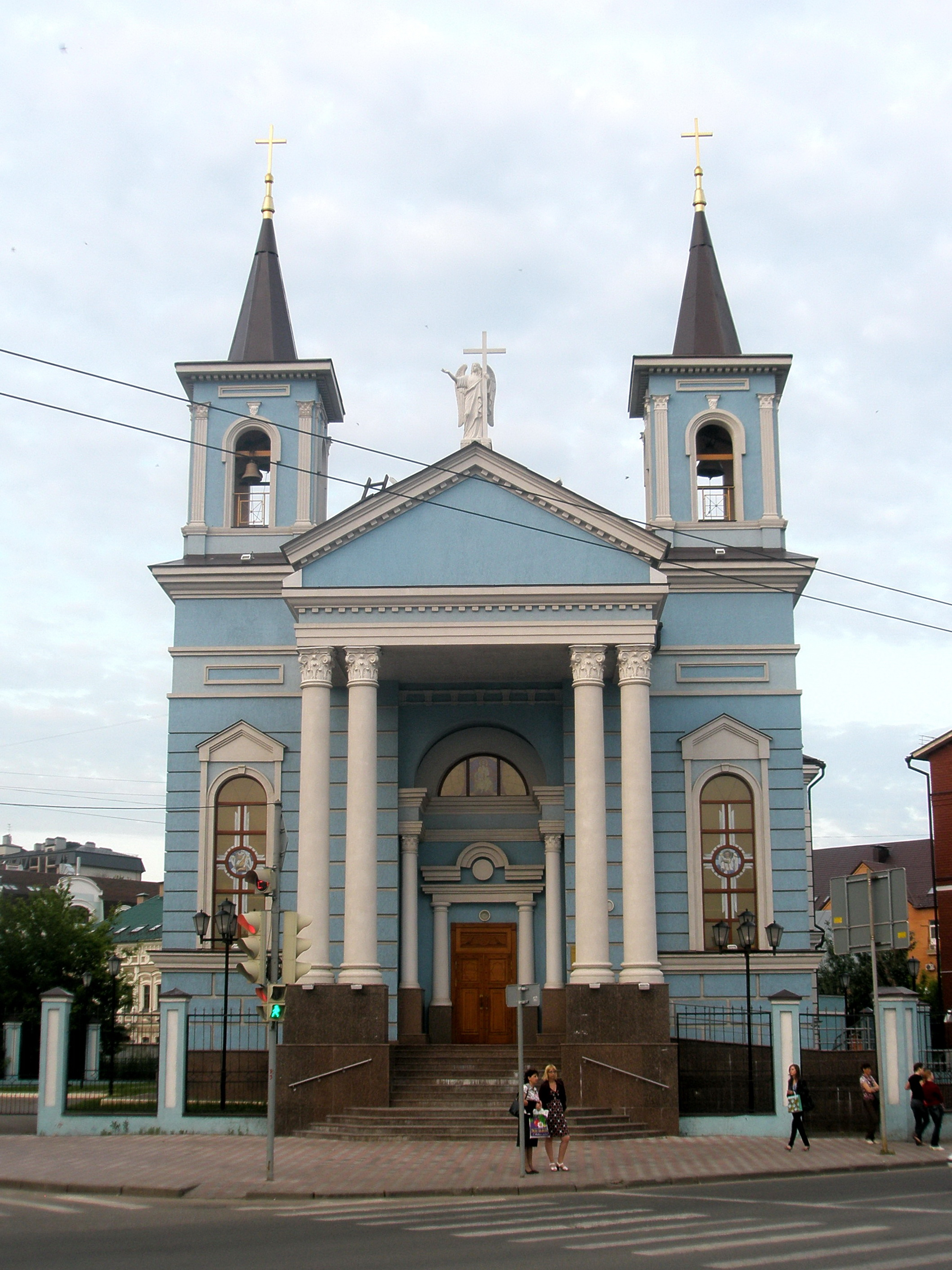 Храм Воздвижения Святого Креста — католический храм в Казани.